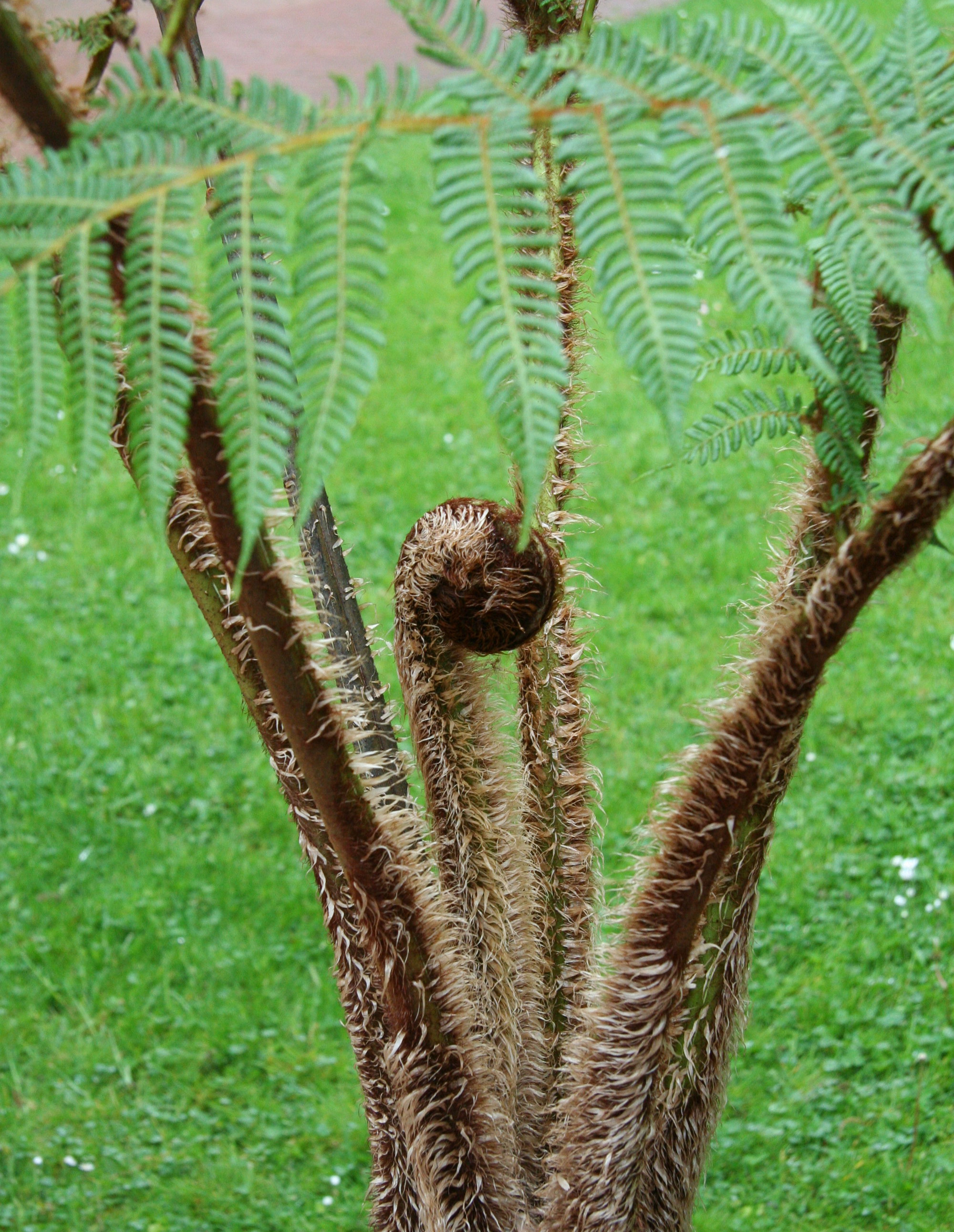 Cyathea tomentosissima im Botanischen Garten Köln